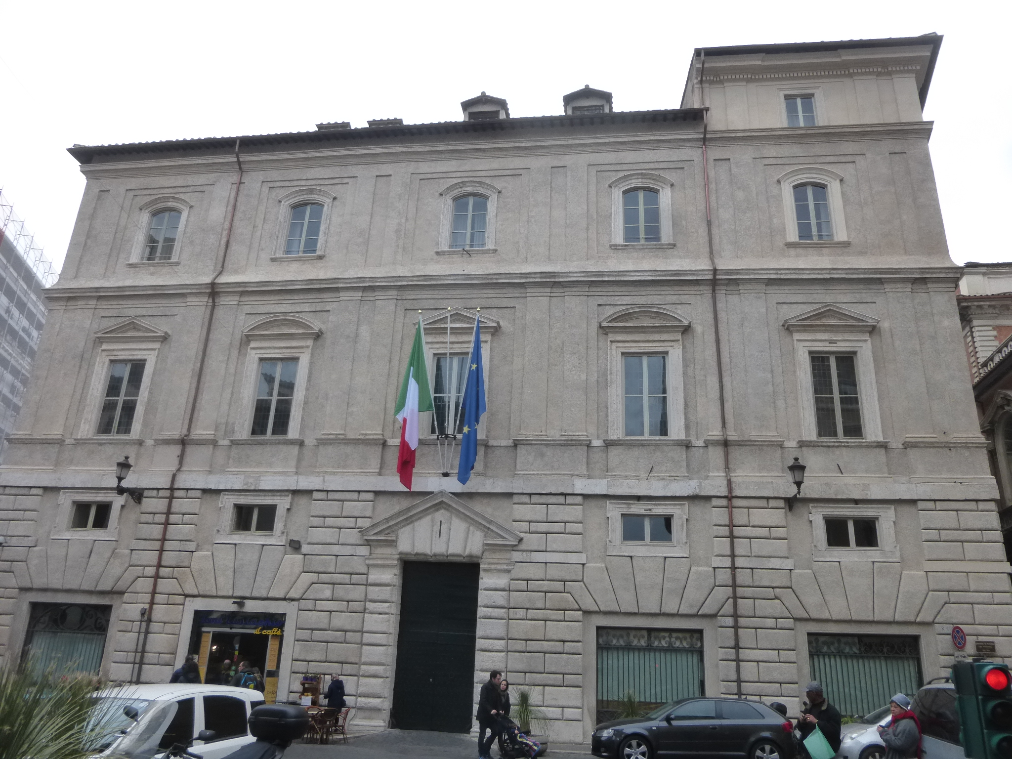 Roma, piazza S. Eustachio, palazzo Cenci alla Dogana restaurato dal Senato.